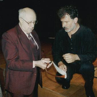 Mstislav Rostropovich und Michael Bach mit BACH.Bogen